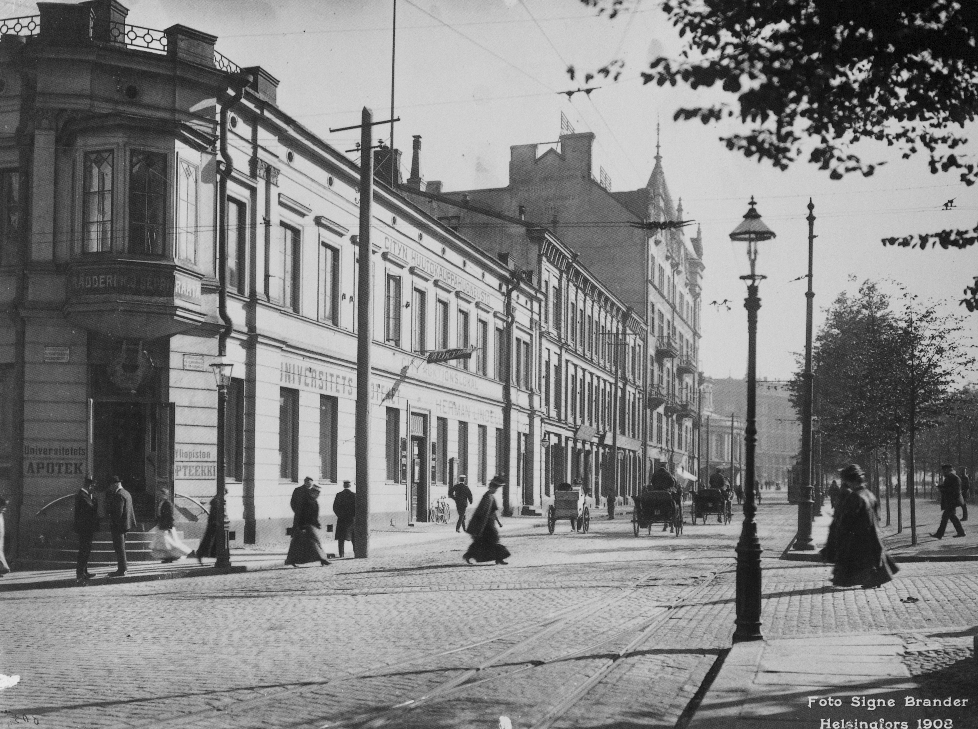 Heikinkadun (nykyään Mannerheimintie) ja Aleksanterinkadun kulma vuonna 1908. Etualalla apteekintalo, jonka Stockmann osti vuonna 1911.